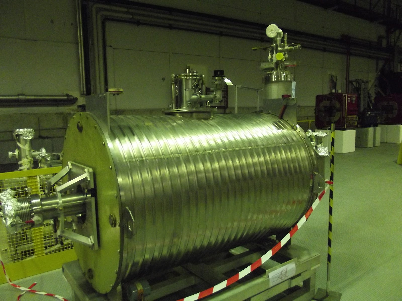 הדור הראשון של מלכודת אנטי-מימן בה השתמשו במסגרת קבוצת ALPHA במחקר שלהם ב- CERN בשנת 2010.